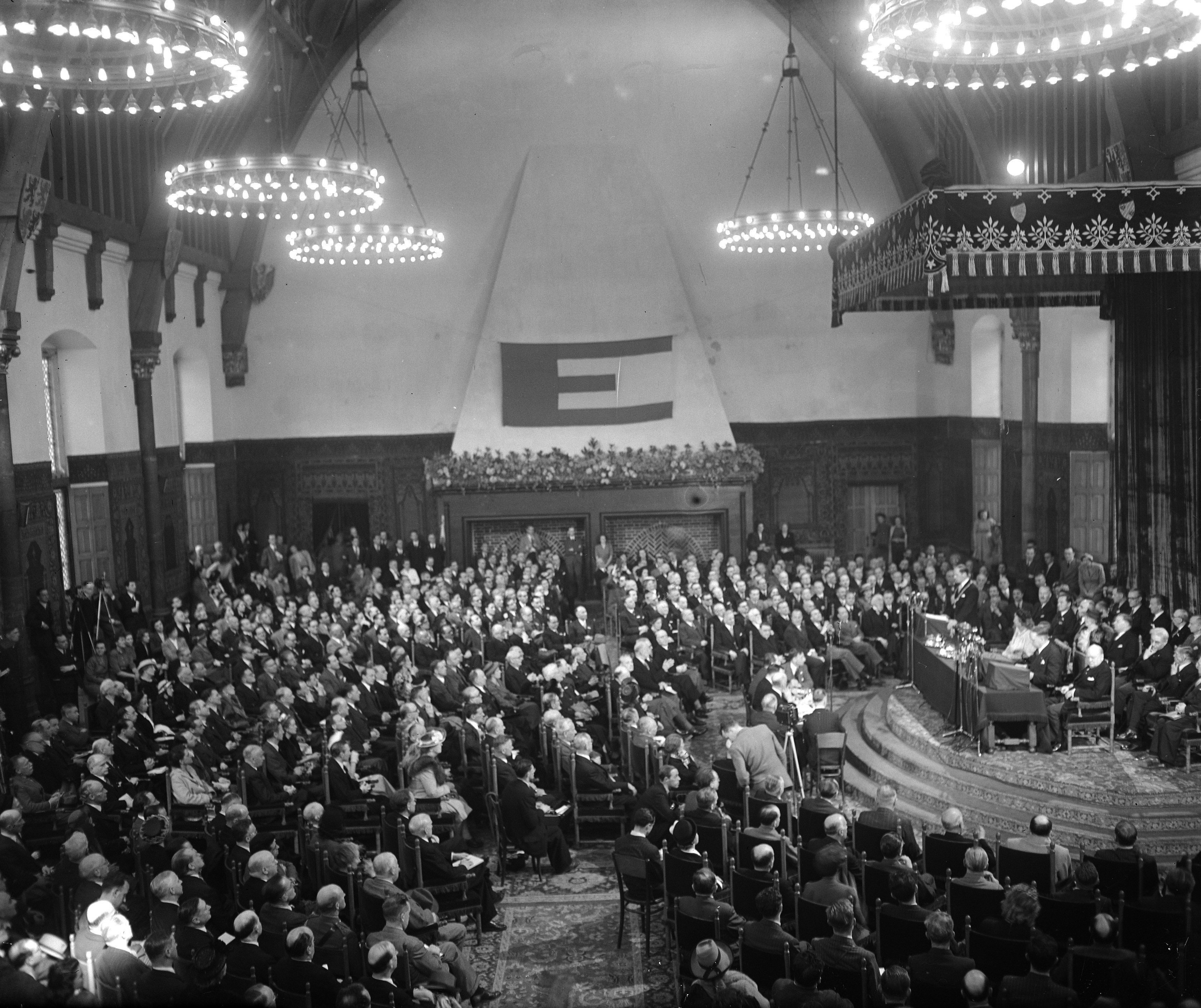 Collectie / Archief : Fotocollectie Anefo Reportage / Serie : [ onbekend ] Beschrijving : Congres van Europa in de Ridderzaal. Overzicht Annotatie : Toespraak van de burgemeester van Den Haag W.A.J. Visser,. Achter de tafel zitten o.a. prinses Juliana en Winston Churchill Datum : 8 mei 1948 Locatie : Den Haag Trefwoorden : conferenties, internationale organisaties Fotograaf : Snikkers, […] / Anefo Auteursrechthebbende : Nationaal Archief Materiaalsoort : Glasnegatief Nummer archiefinventaris : bekijk toegang 2.24.01.09 Bestanddeelnummer : 934-6838